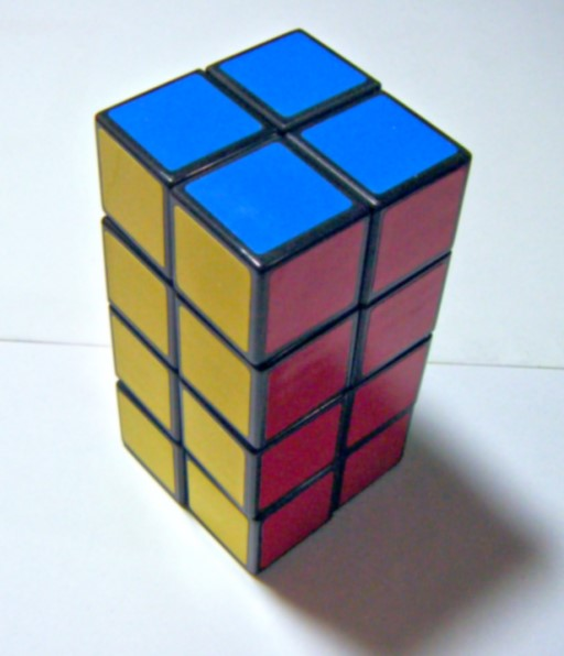 中文（台灣）: 復原後的2x2x4魔術方塊